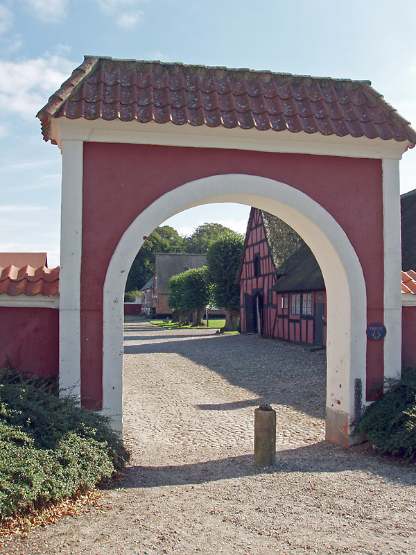 Tjele gods, port ind til gården. Den ligger i Tjele Sogn, Sønderlyng Herred, Viborg Amt, Denmark